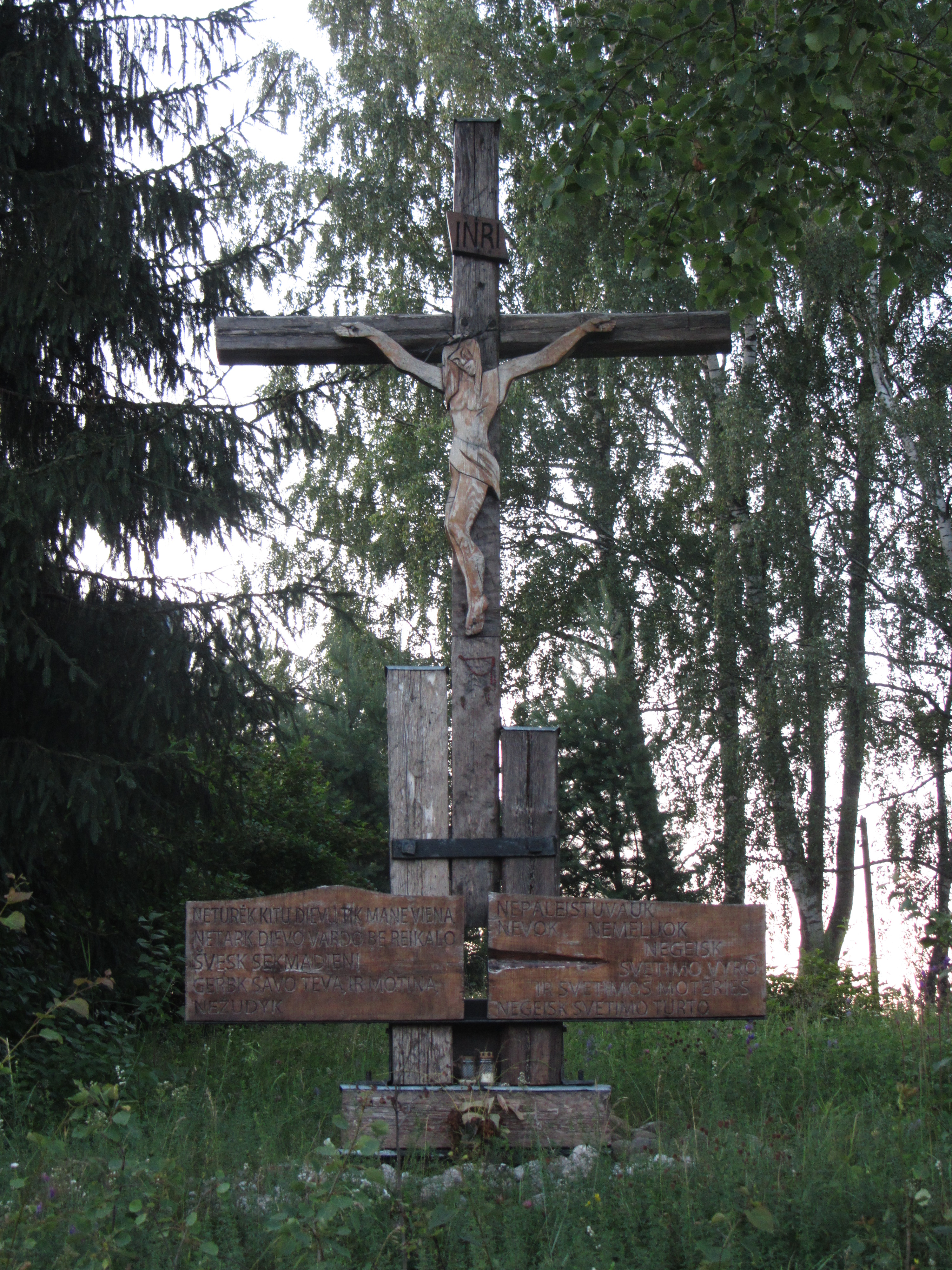 Vencavai, Lithuania